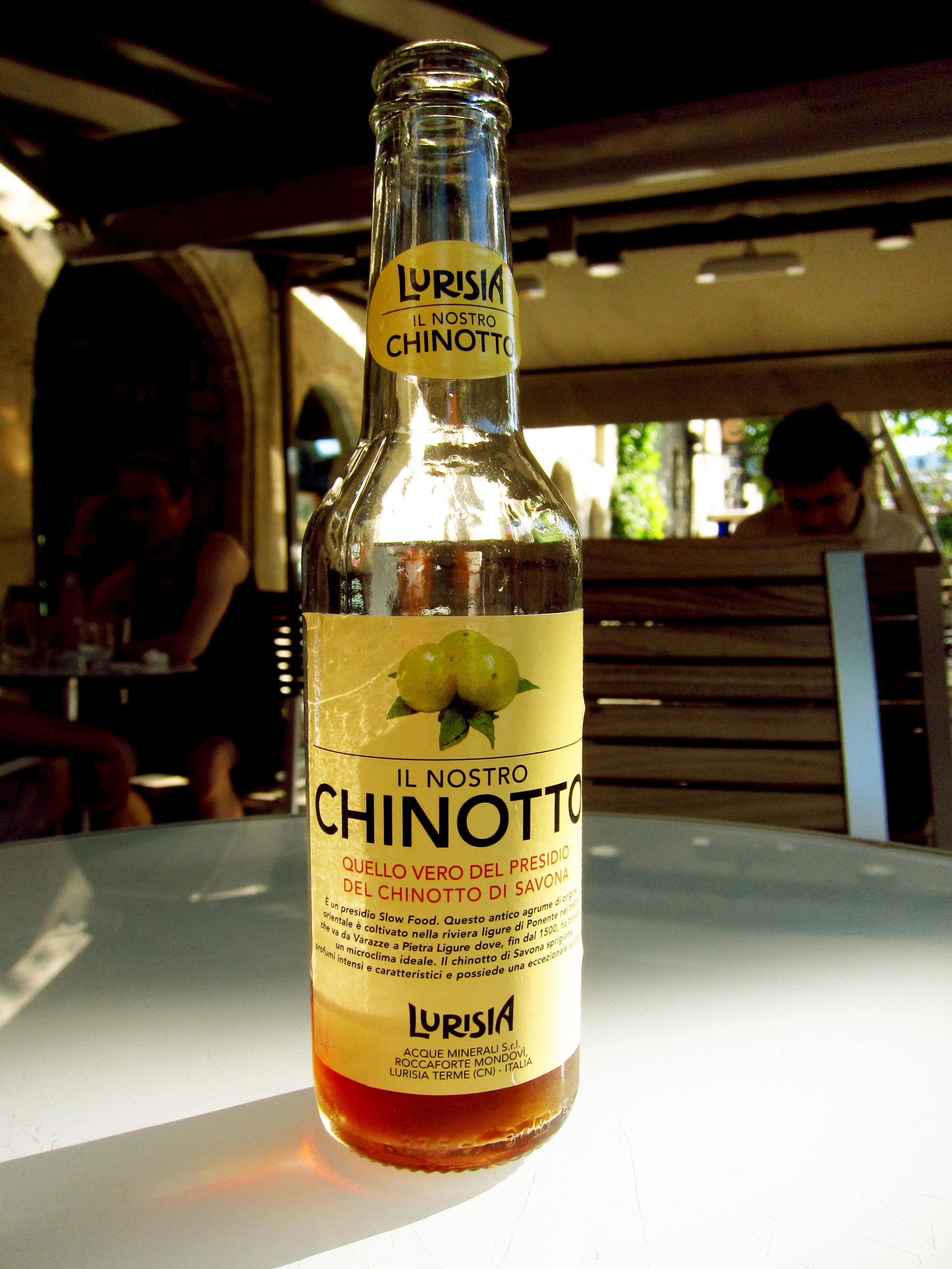 Paris (Île-de-France, France) : Un chinotto de Lurisia au Espressamente Illy de la Cour Saint-Émilion.